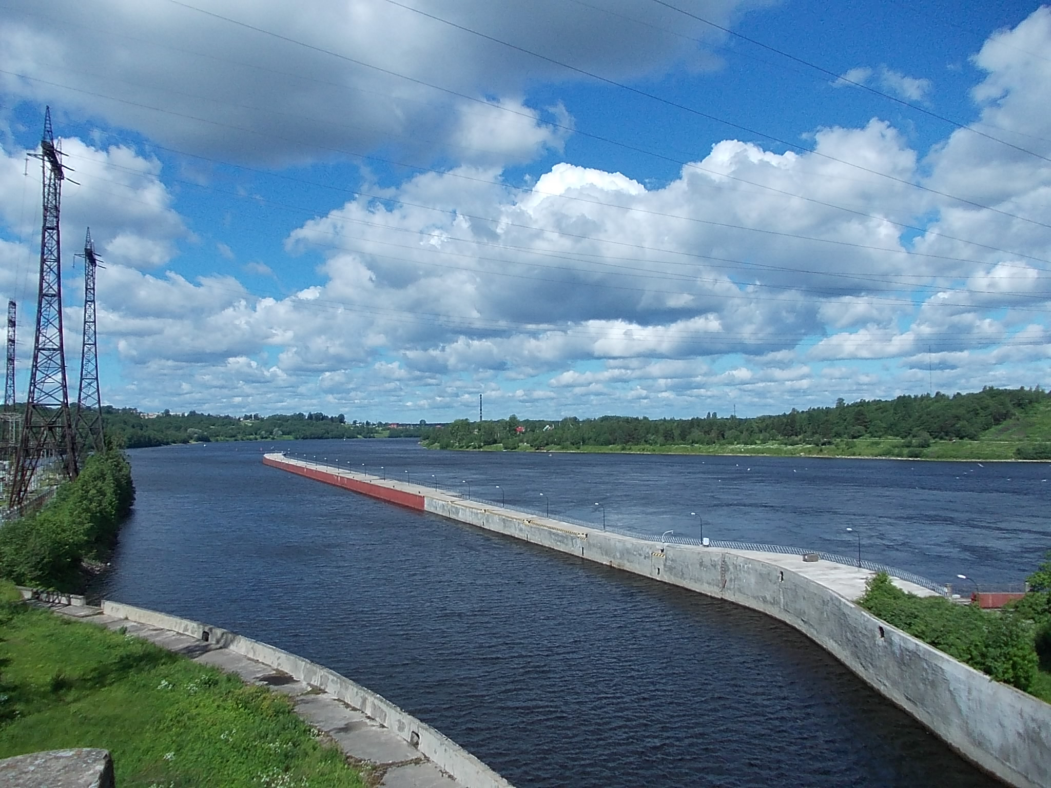 Вид со шлюза Верхнесвирской ГЭС